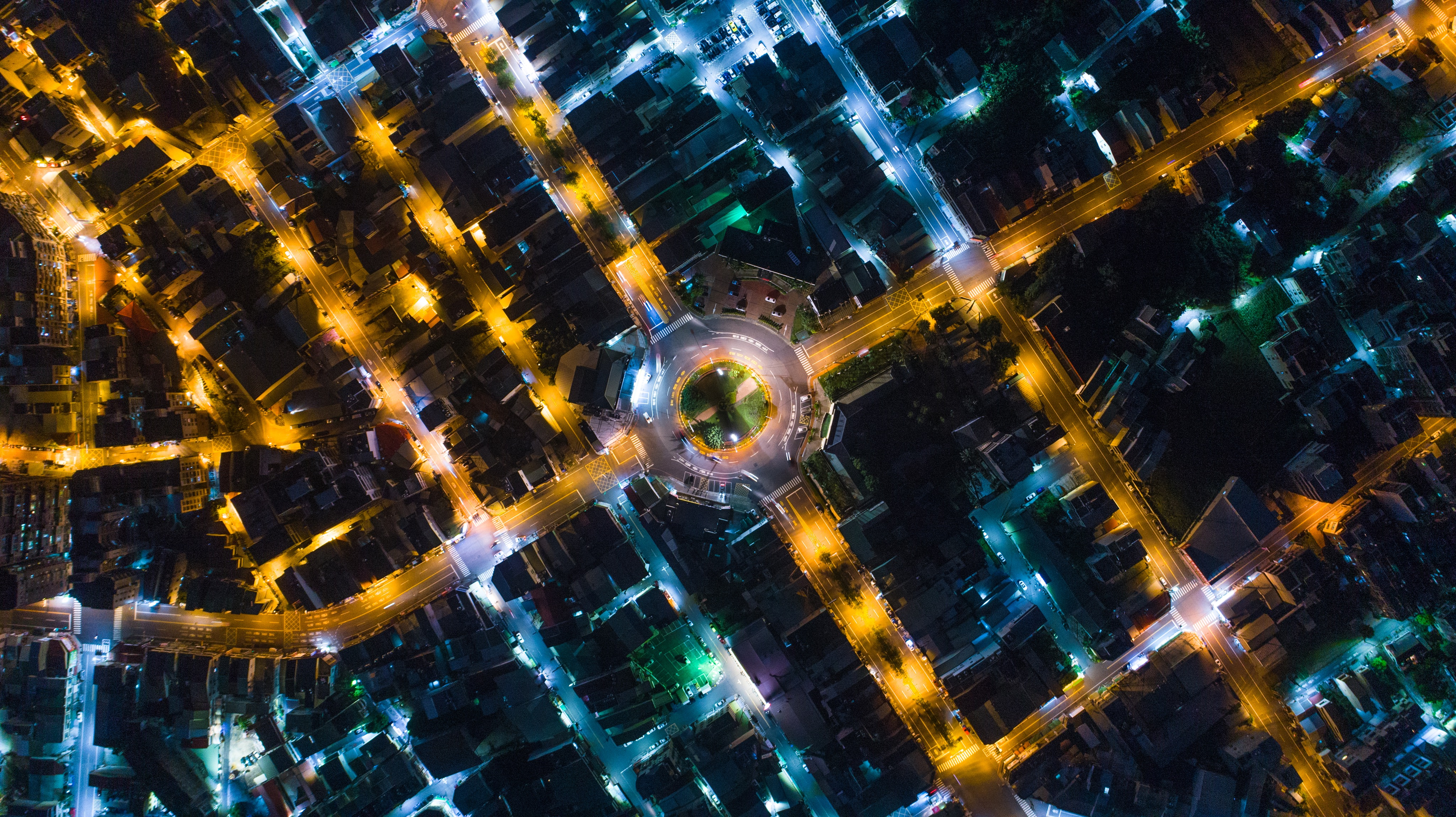 中文（台灣）: 夜間歸仁圓環附近